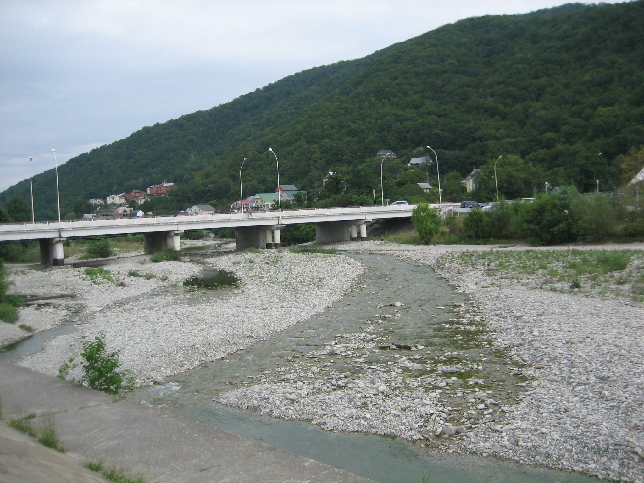 Мост через р. Небуг